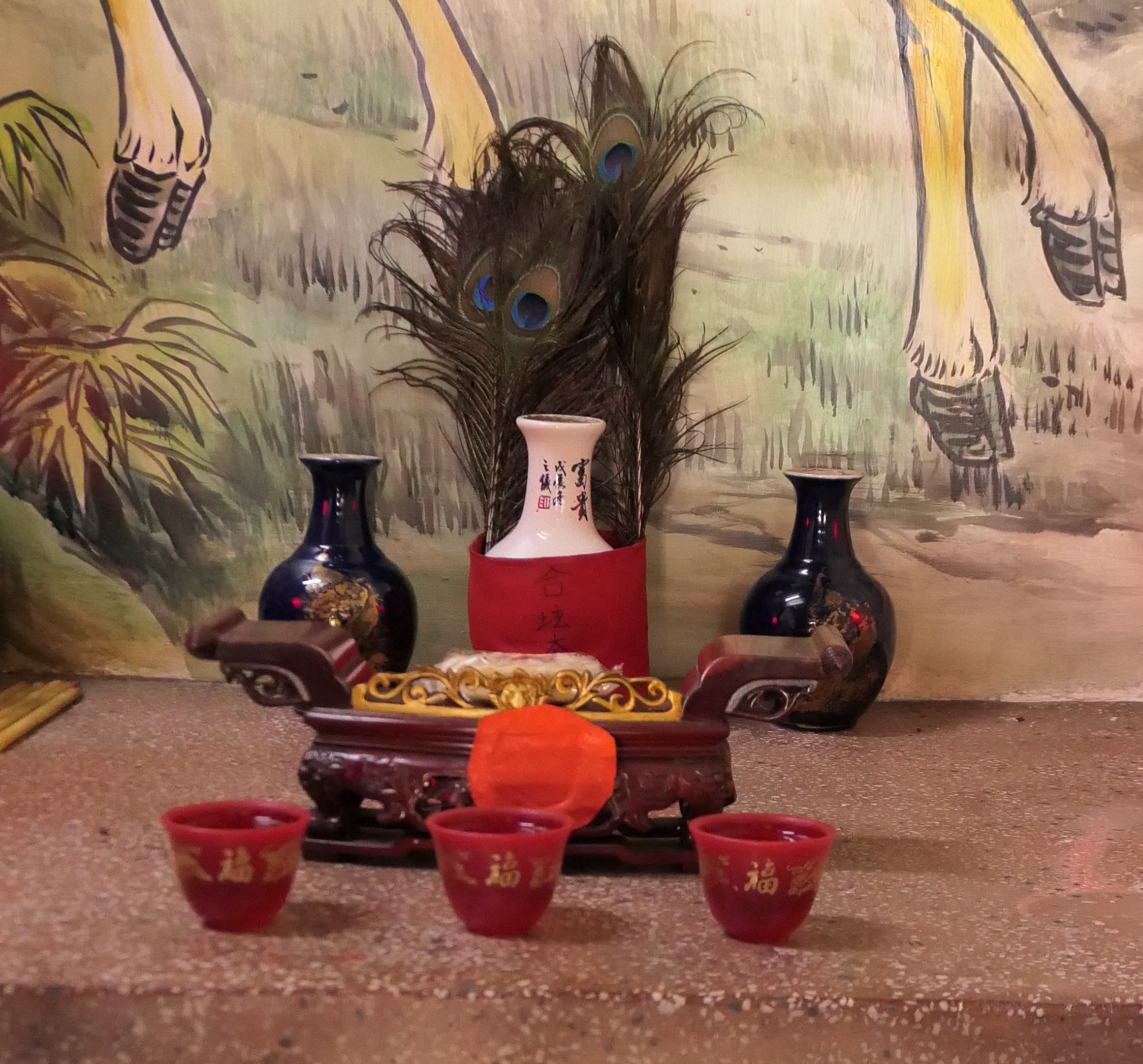 菜寮復興宮太祖三姊妹